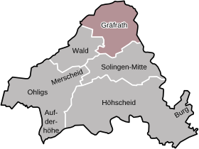 Lage des Stadtbezirks Gräfrath in der Stadt Solingen